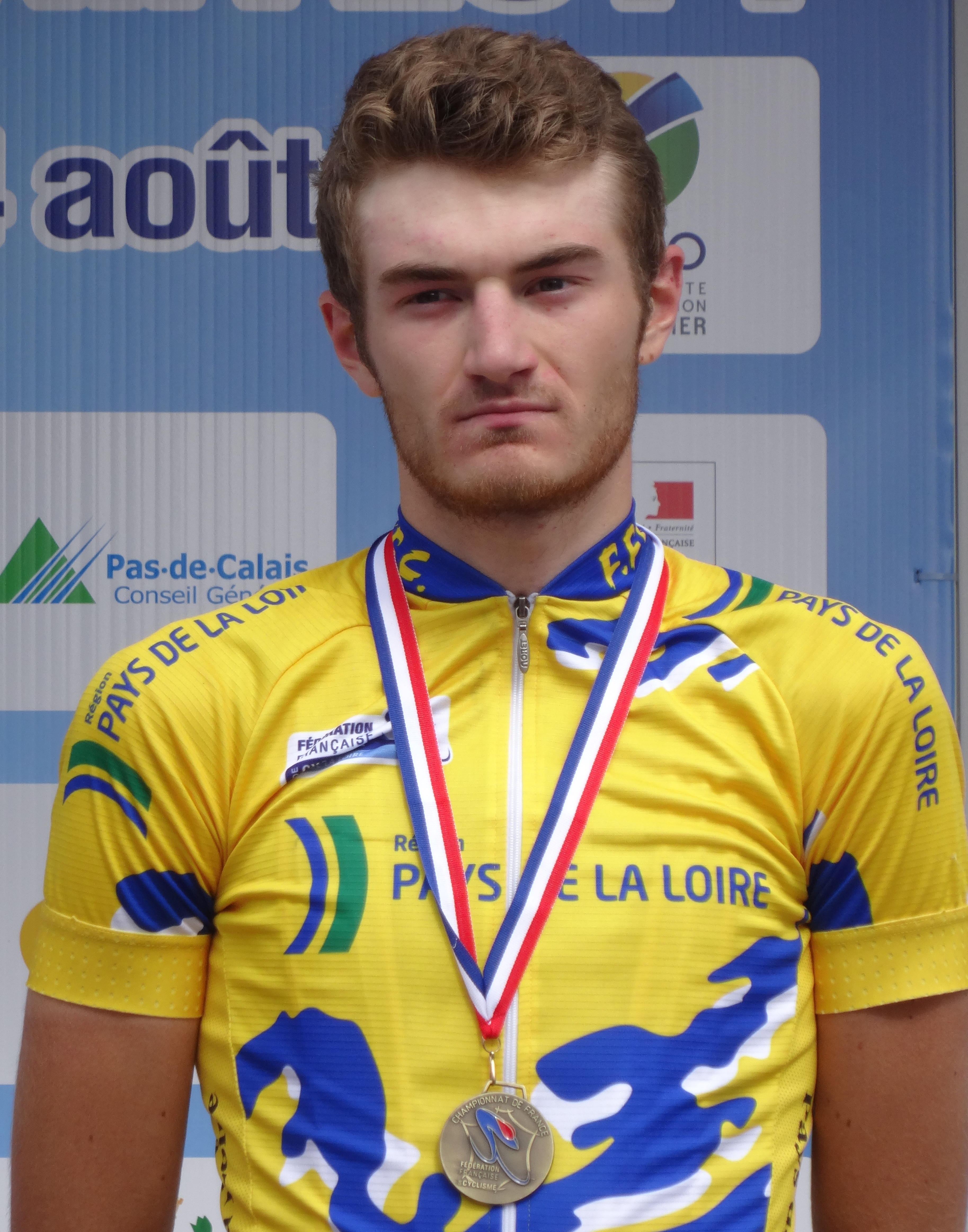 Reportage photographique réalisé le dimanche 24 août à l'occasion des Championnats de France de cyclisme sur route 2014 à Saint-Omer, Pas-de-Calais, Nord-Pas-de-Calais, France. Course en ligne, Espoirs hommes.